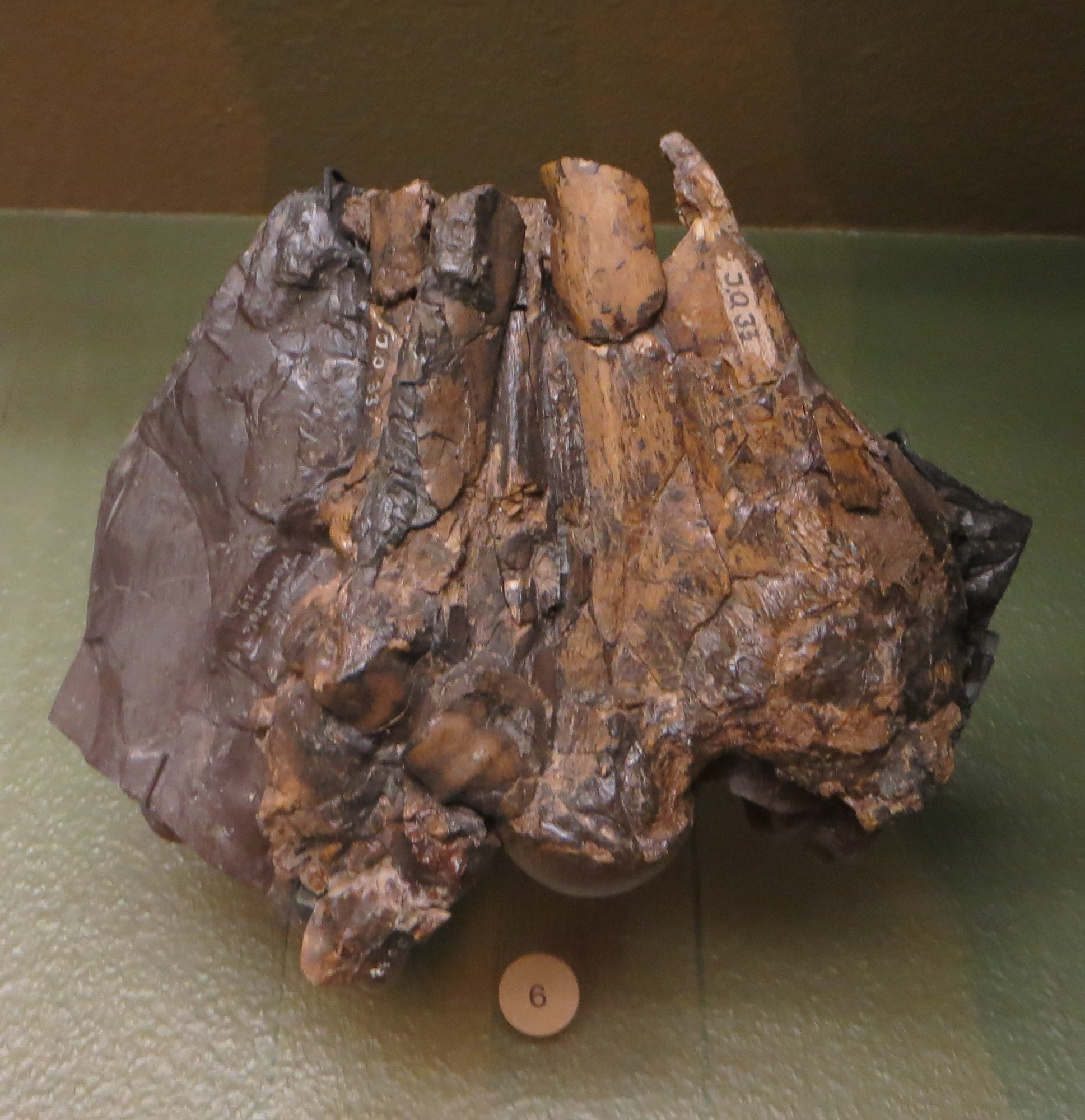 Fossil of Anthracotherium- Took the picture at Natural History Museum, Basel